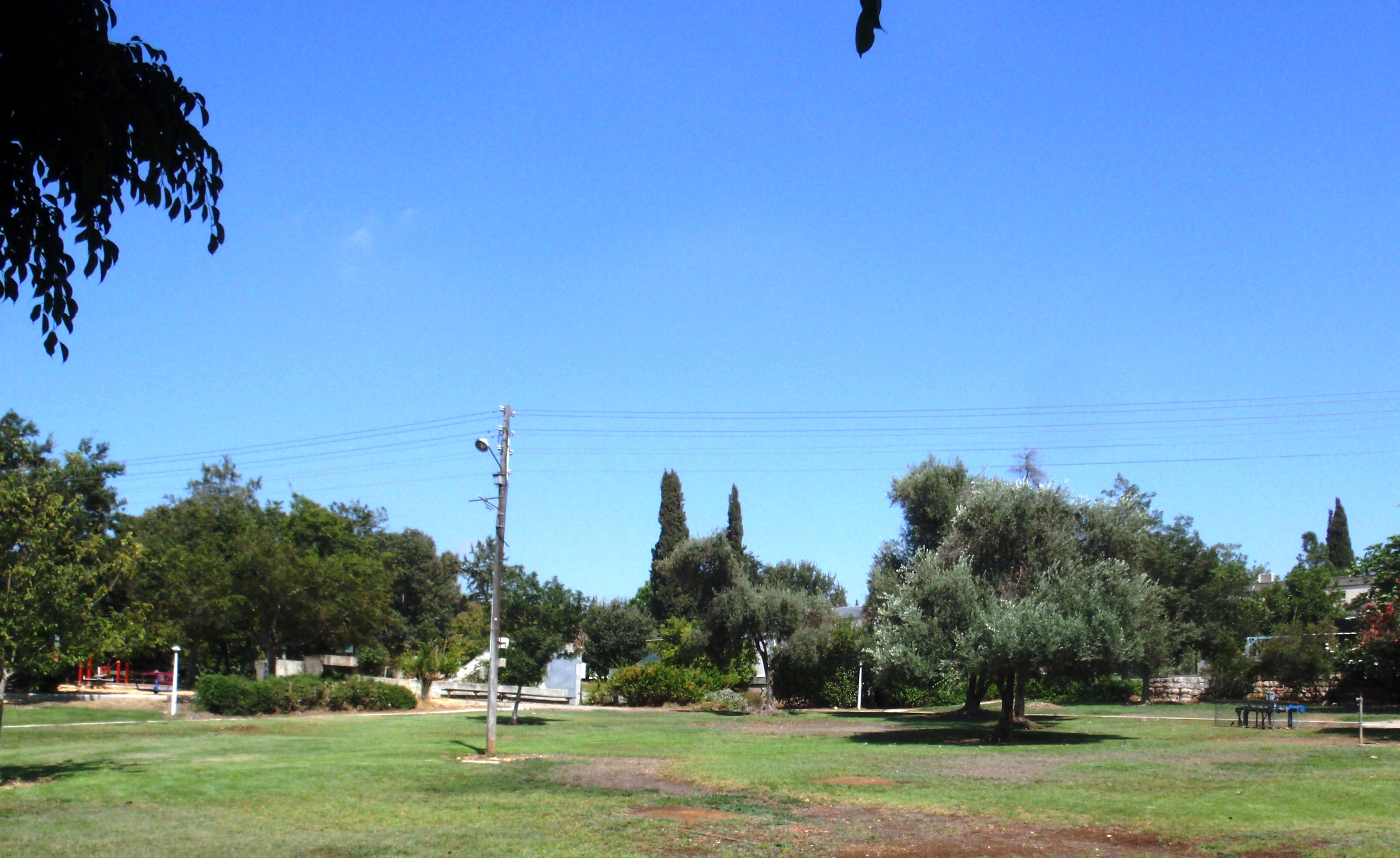 חורשים מבט בתוך הקיבוץ